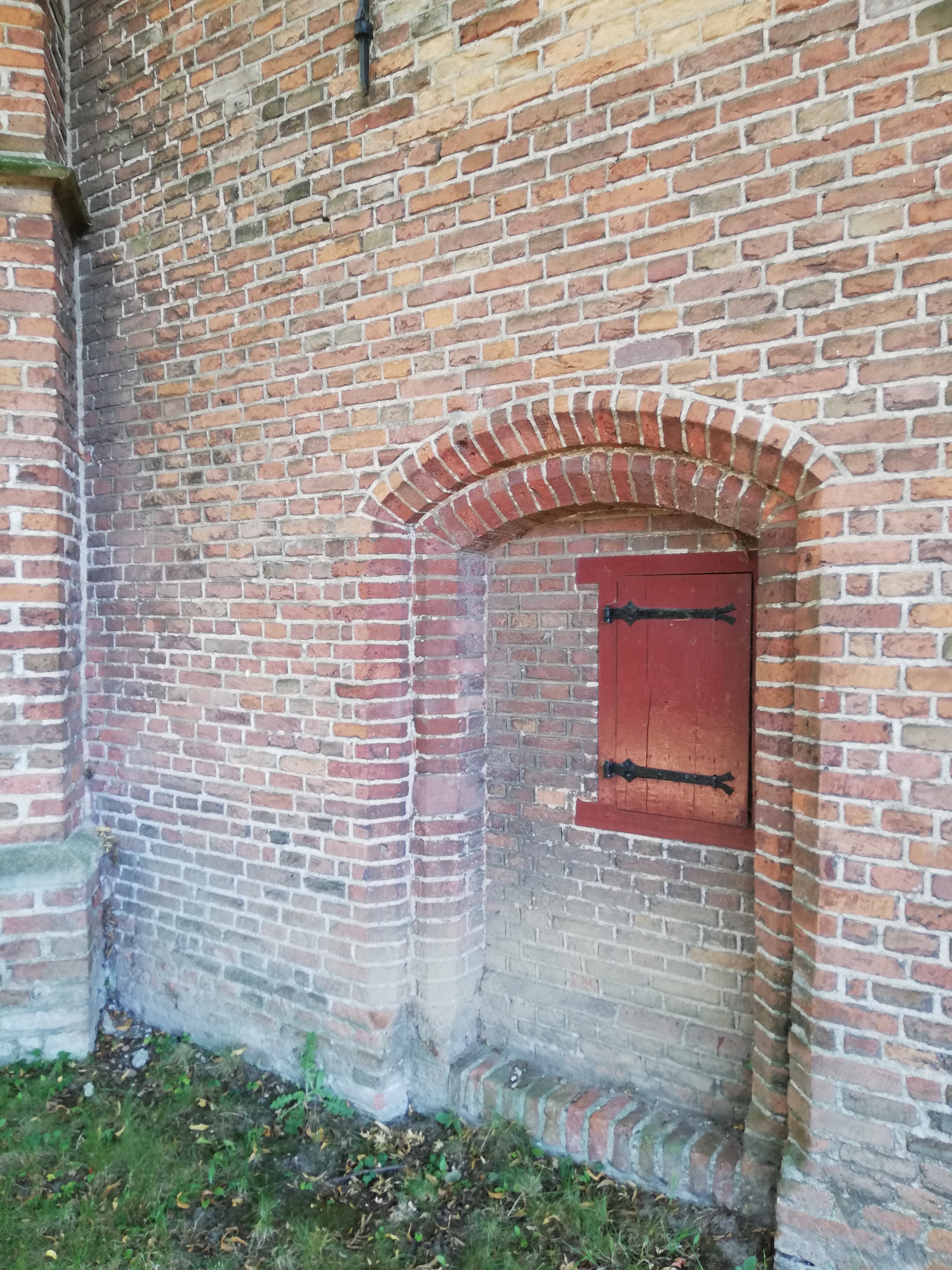 Melaatsenluikje - Luikje in de Sint-Maartenskerk waardoor zieken in de Middeleeuwen de mis konden bijwonen